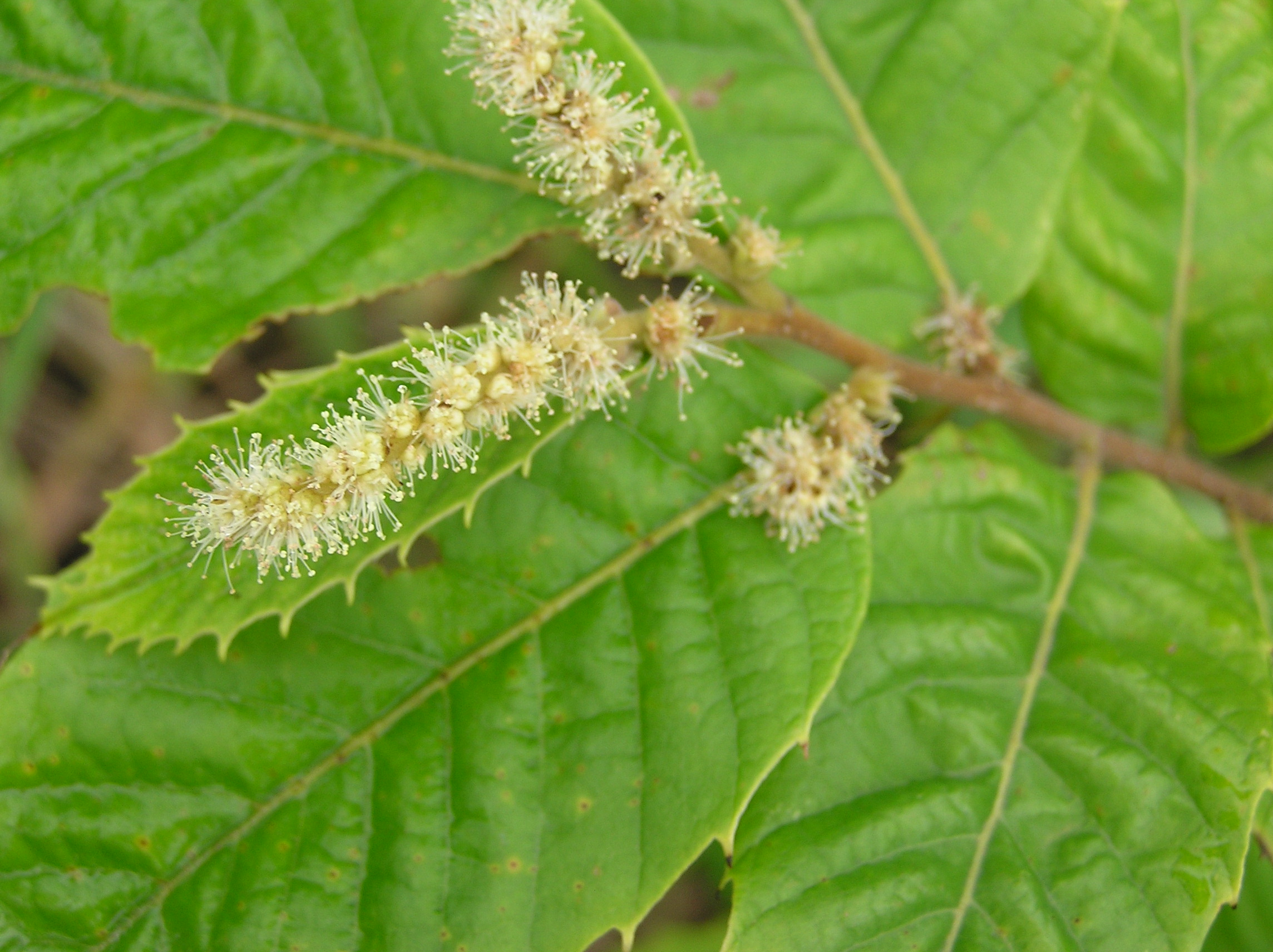 Castanea seguinii. Foto tomada en el Jardín Botánico de Iturraran.